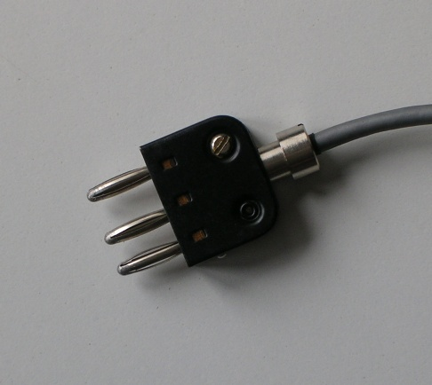 Messgerätestecker, Norm der Nachrichtentechnik in Analogtechnik